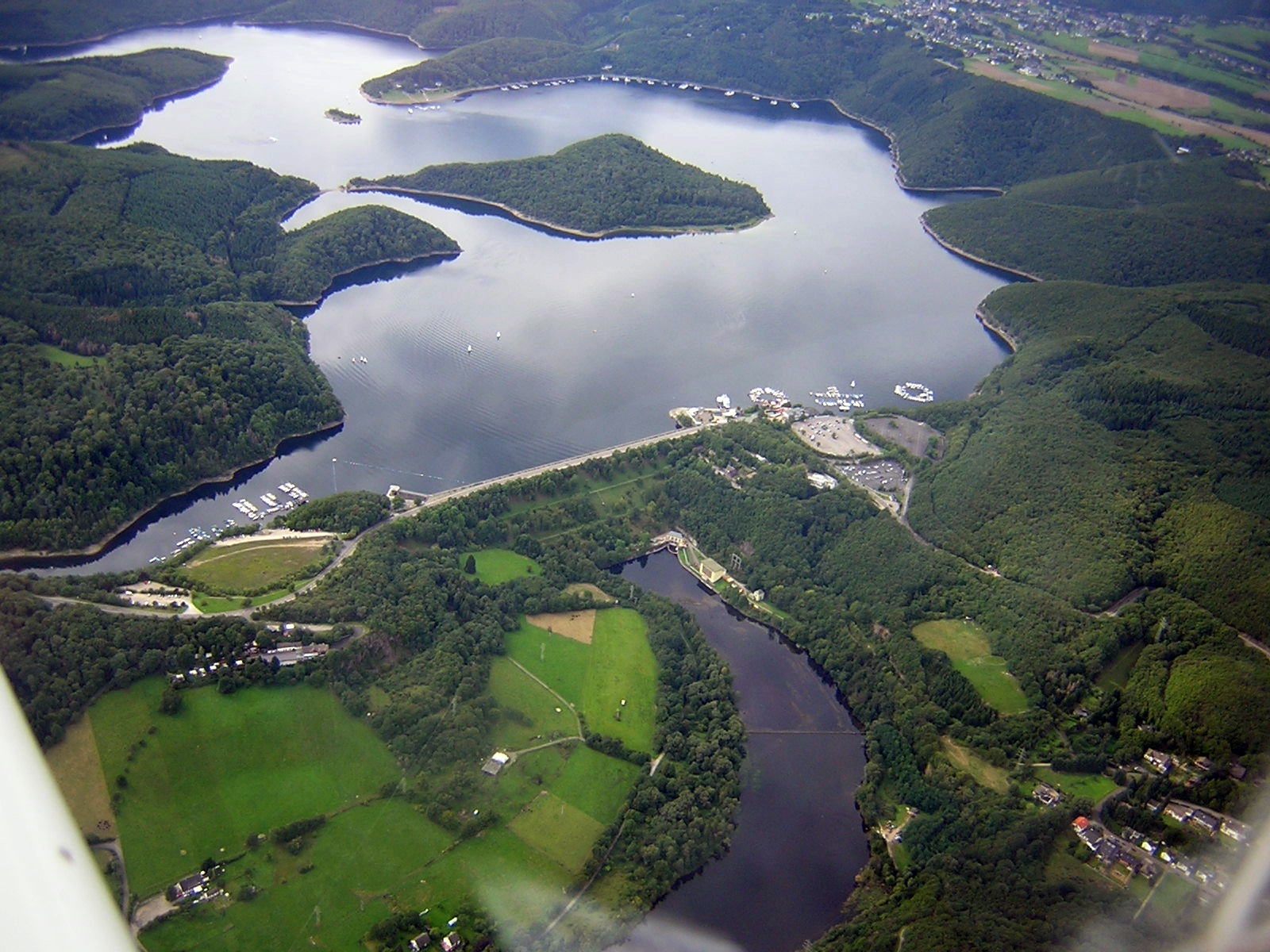 Luftaufnahme von „Rurtalsperre Schwammenauel“ (Staudamm) und „Rurstausee“ mit: Halbinsel am Tonsberg (linke Bildmitte) Insel Eichert (Bildmitte) Halbinsel Eschauel (hinten rechts) die Halbinsel hinten links trägt die Flurnamen „Auf dem Schlitt“ und „Morschauerheid“